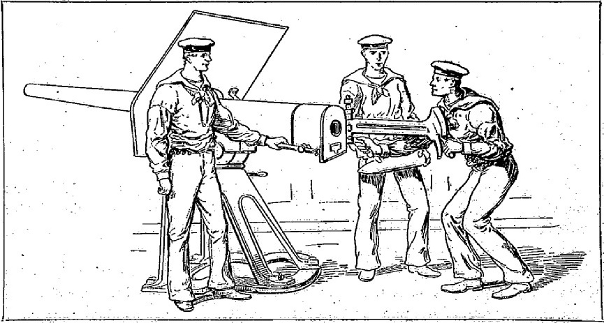 Préparatifs de combat a bord du «Détroit».